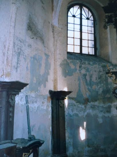 interier